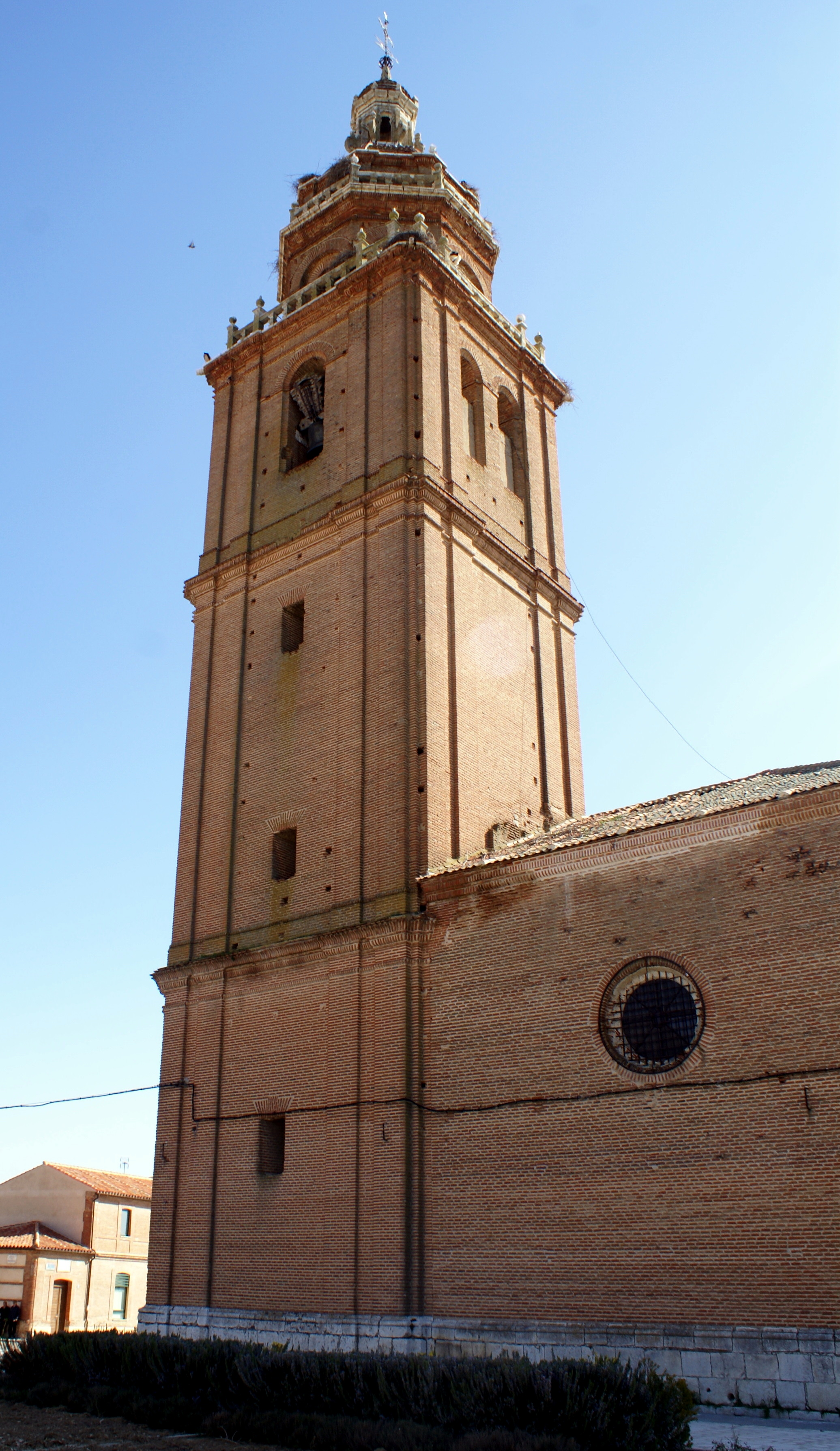 Torre de la iglesia de Santa María Magdalena de Matapozuelos, Valladolid, España.